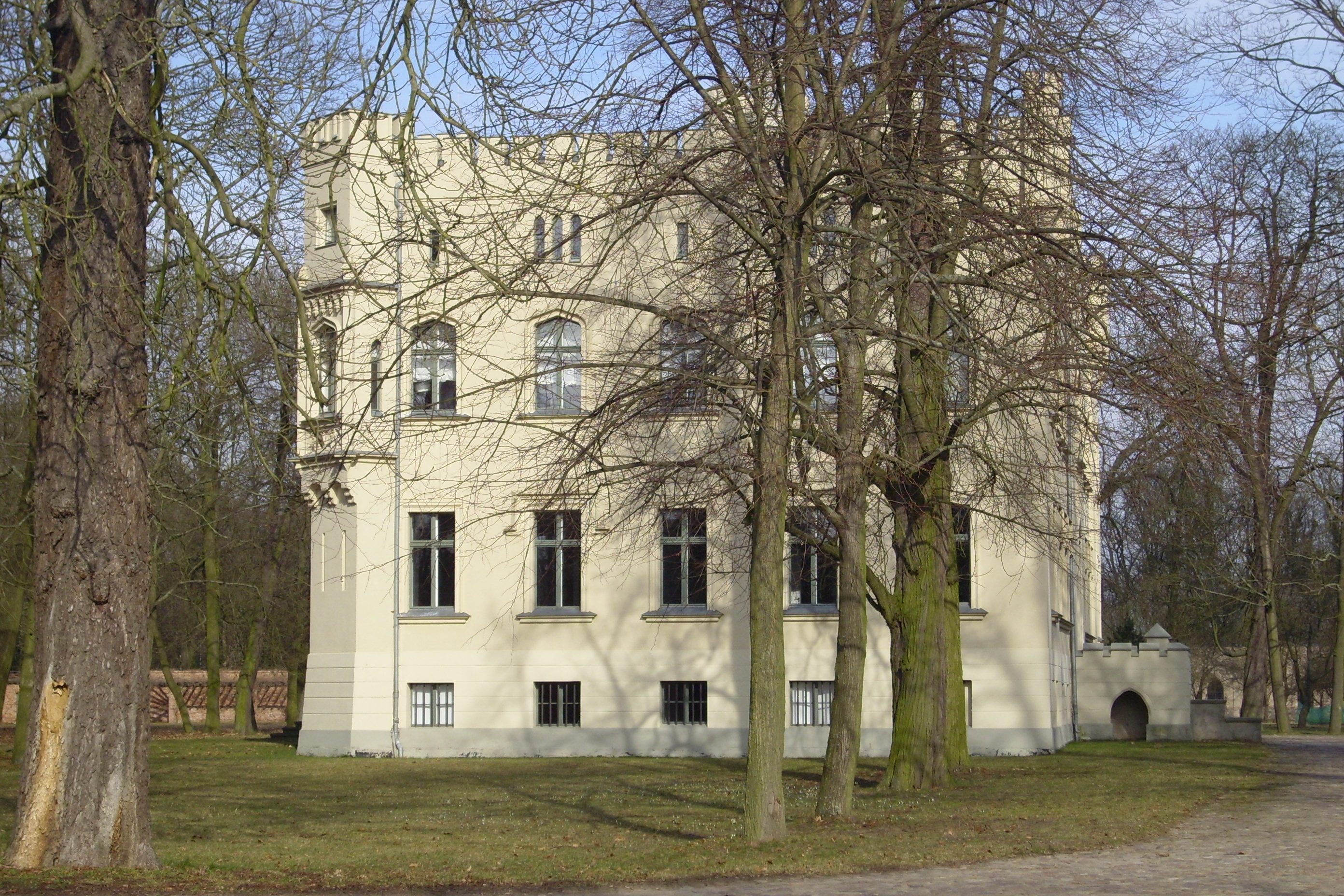 Trebbin, Ortsteil Märkisch Wilmersdorf in Brandenburg. Das Gutshaus entstand 1801 und wurde 1901 erweitert und im Tudorstil umgebaut. Das Haus steht unter Denkmalschutz.